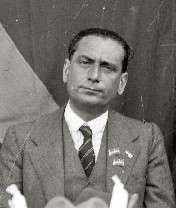 Manuel Carrasco i Formiguera (Unió Democratica de Catalunya) fue uno de los asistentes al Aberri Eguna de 1933, celebrado en el frontón Maitea, en Atocha, junto con, entre otros, Ewald Ammende (Secretario del Consejo de Minorías Nacionales, de Ginebra), Francesc Maspons i Anglasell (Partit Nacionalista Catalá) o Ramón Otero Pedrayo (Partido Galeguista)